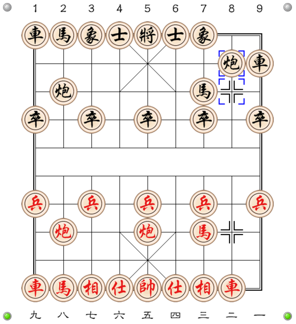 Quy bối pháo